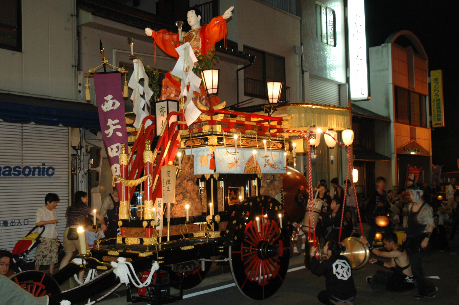 Nishiyada-Machi's Ishidori Matsuri Cart